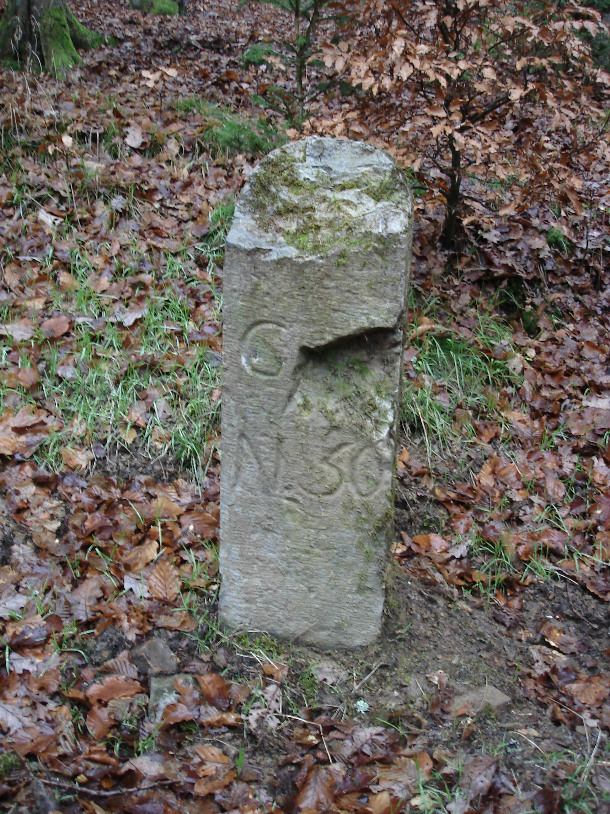 Dieser Grenzstein ist von Wandalen umgeworfen und beschädigt worden. Der Katzenfurter Verein für Heimatgeschichte hat ihn wieder aufgestellt. Inschrift nur noch teilweise erkennbar.